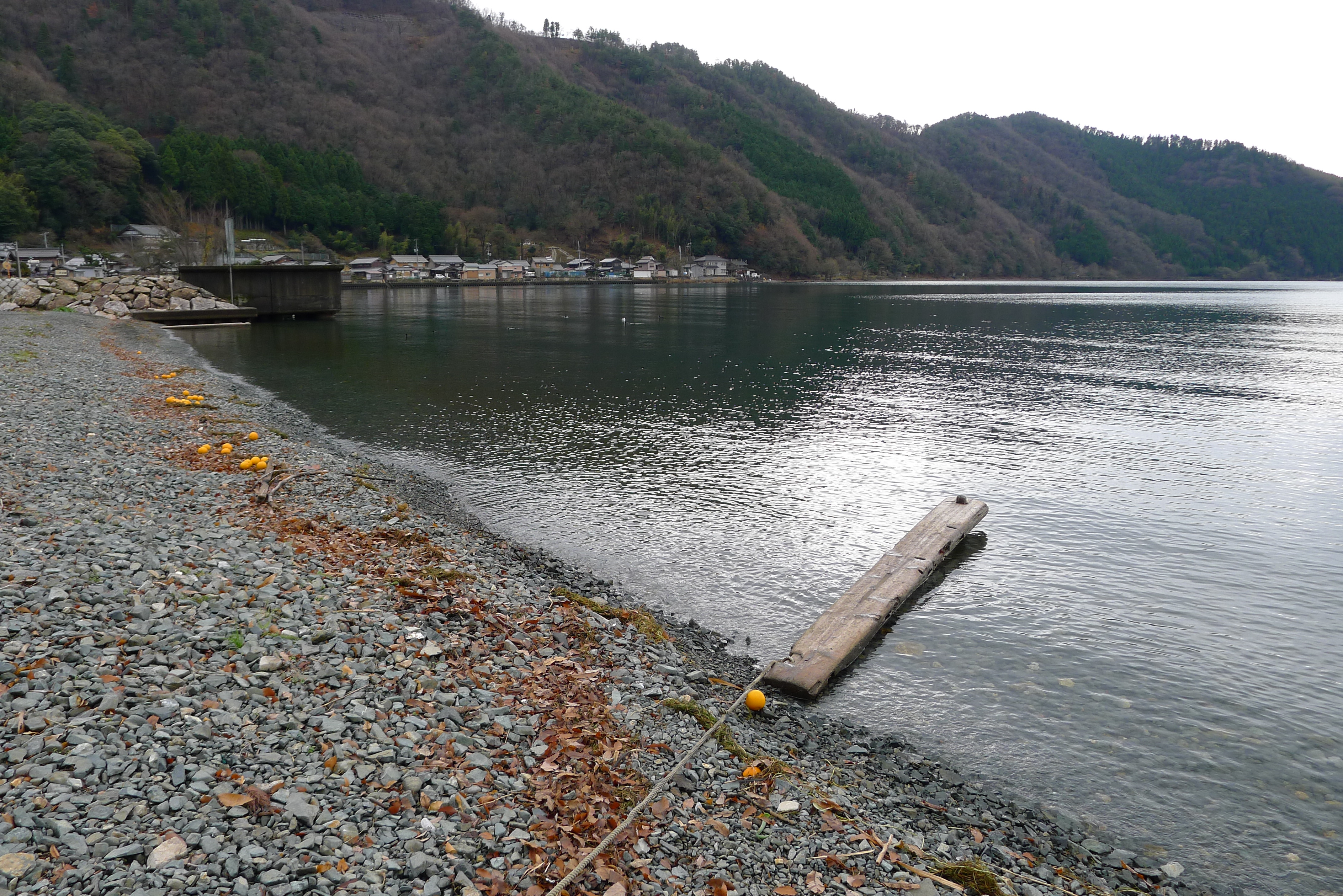 「菅浦の湖岸集落景観」：浮き桟橋、漁港が整備されるまでは舟寄せとして使われていた